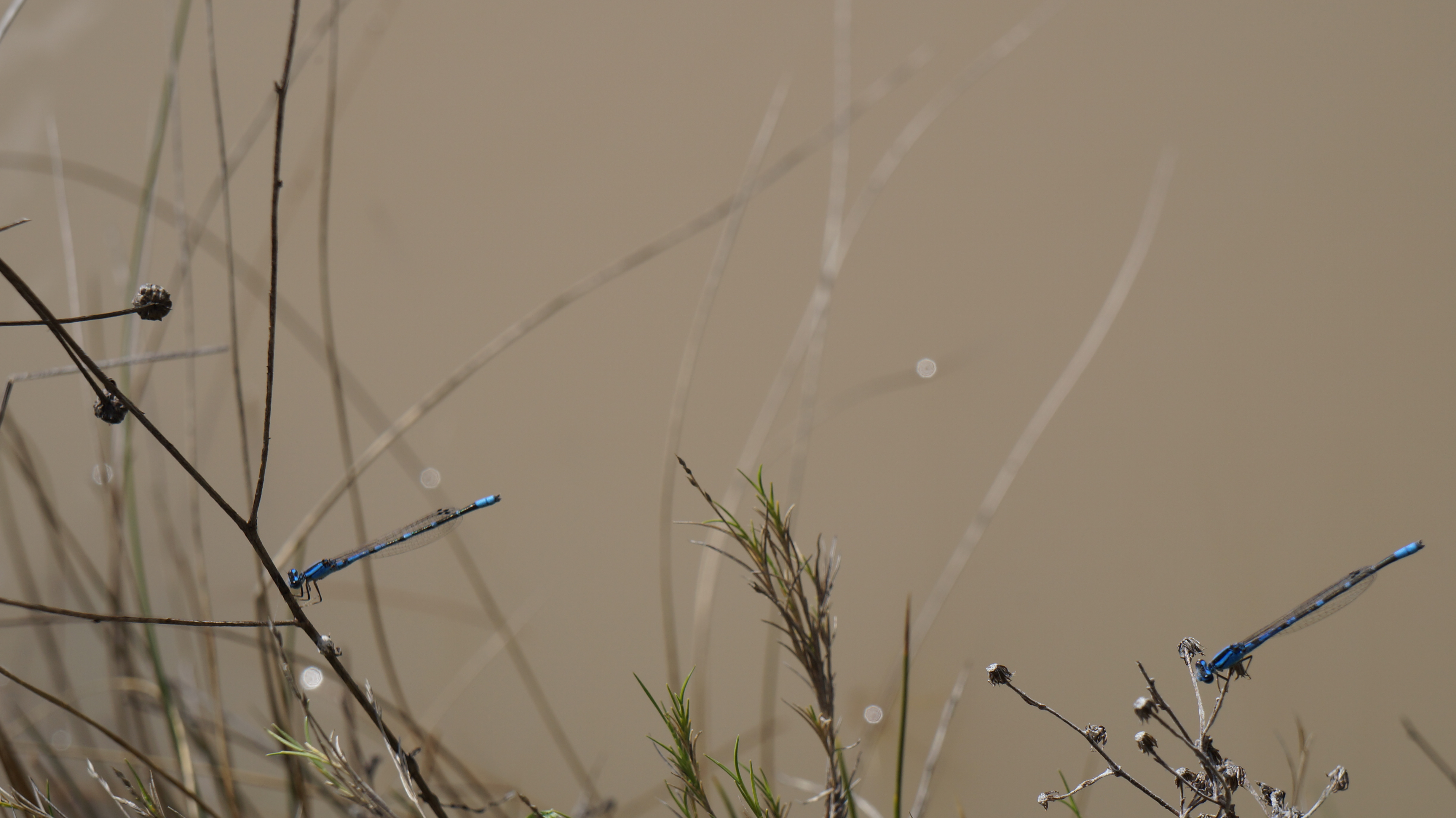 Estos insectos son parte de la vida en Sierra de Cardos.